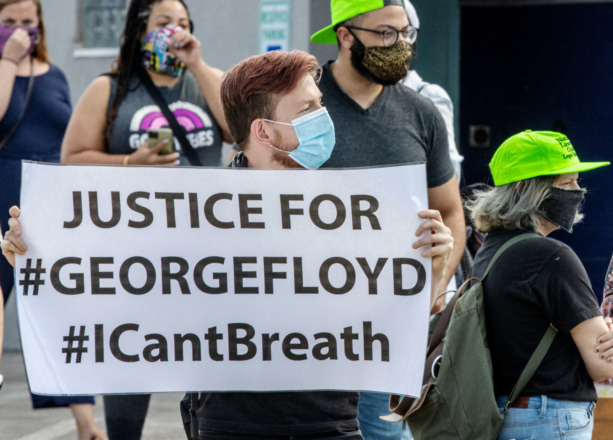 bIMG_1423